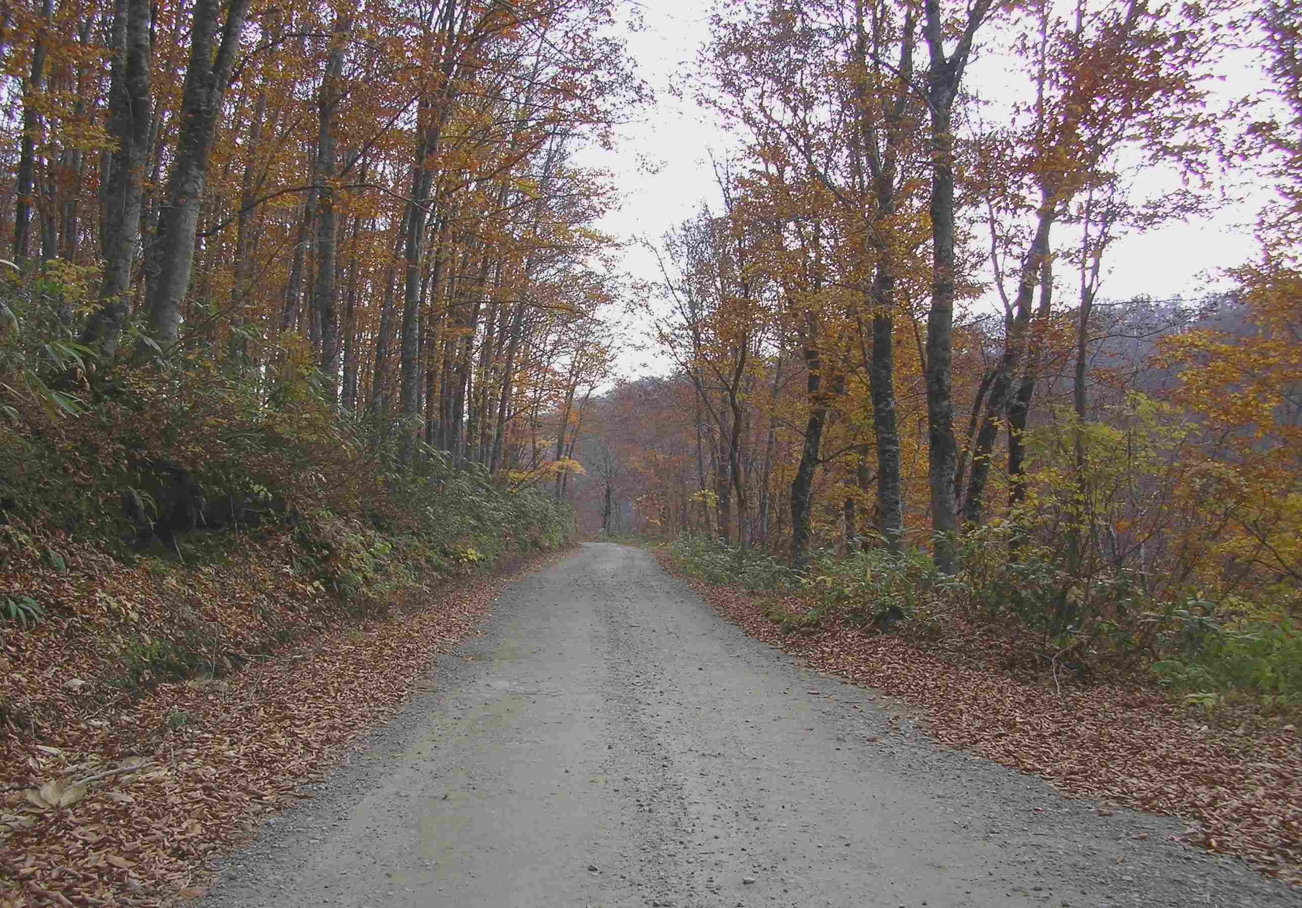 国道458号、肘折温泉から十部一峠へ向かう途上（山形県大蔵村）。日本の国道でも希な未舗装区間。2006年11月